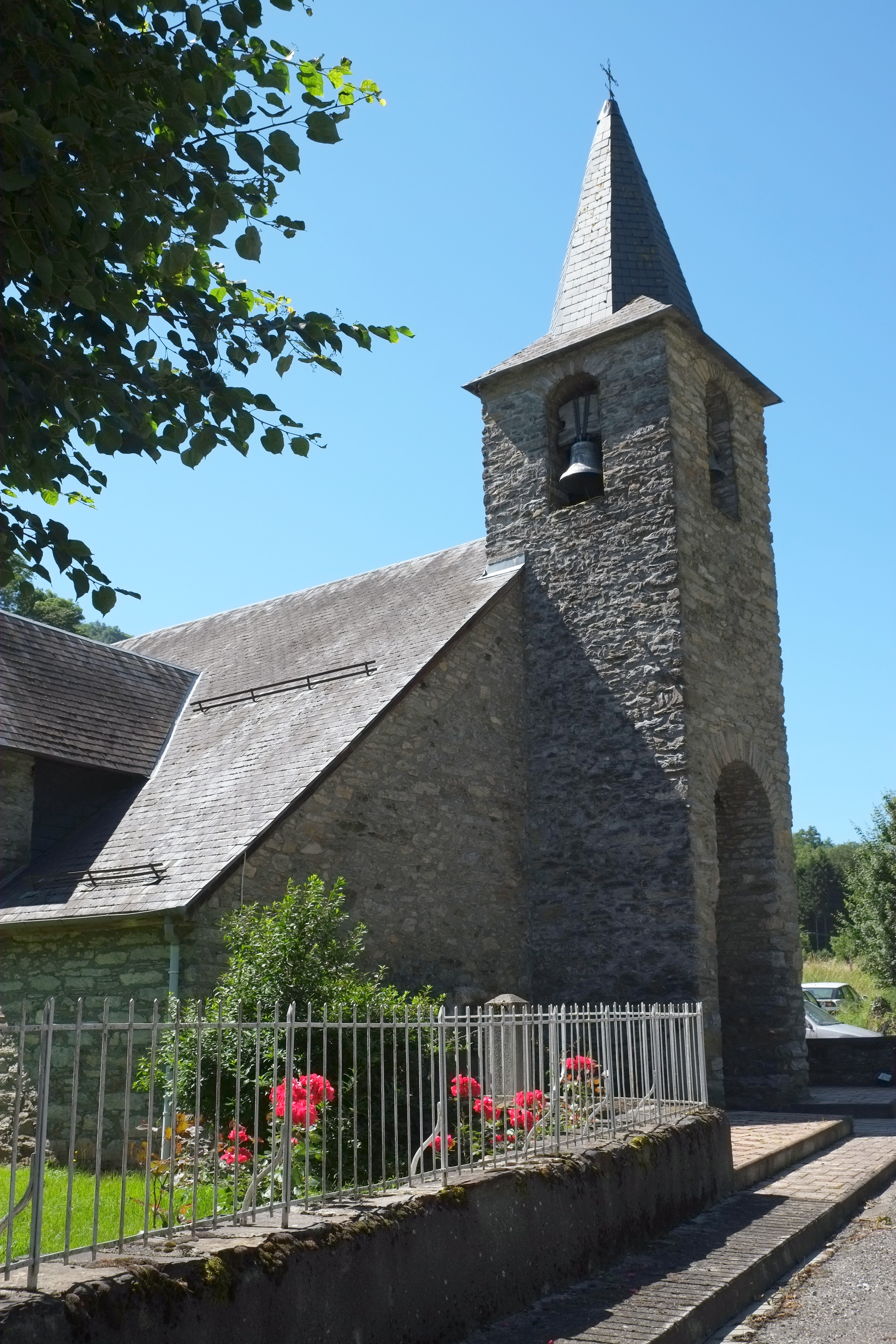 Kirche in Cazaux-Layrisse in Frankreich